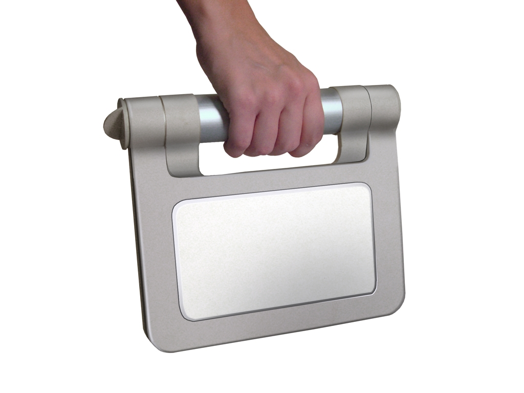 $100 Laptop prototype